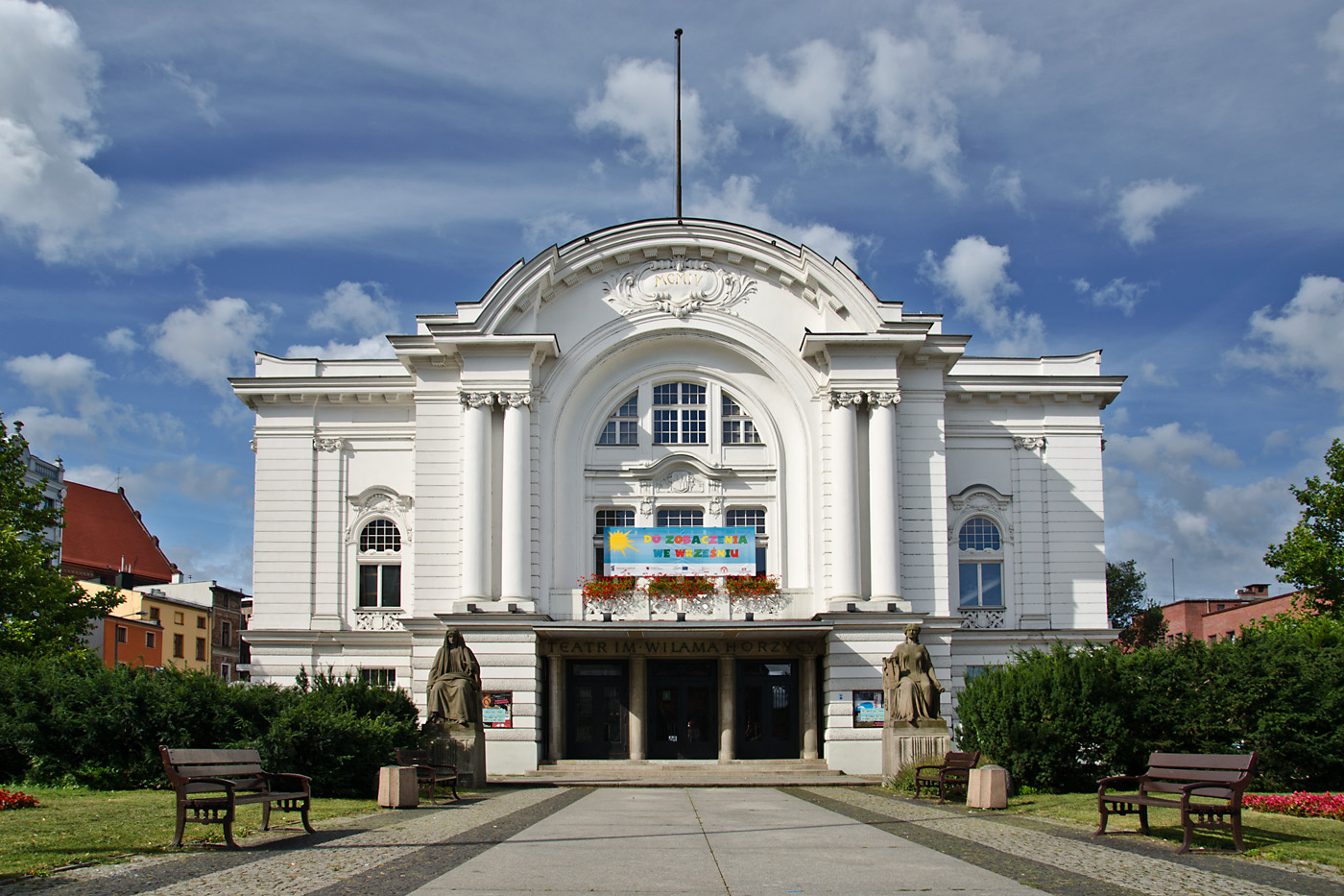 Teatr Miejski, ob. im. Wiliama Horzycy, 1903-1904 Toruń, pl. Teatralny 1, miasto Toruń